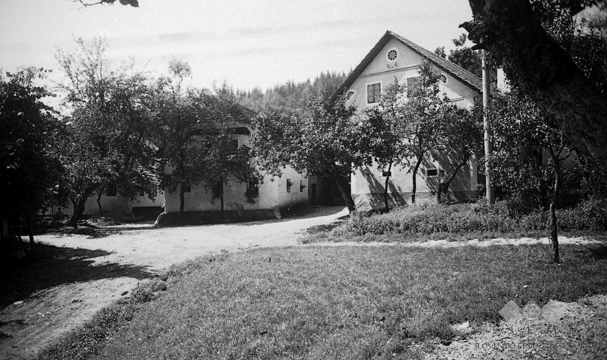 Središče vasi Bičje.